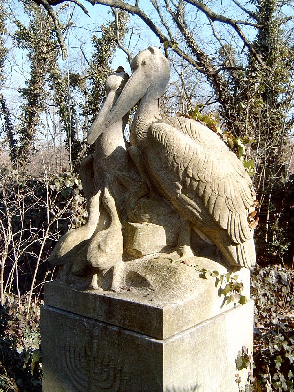 Kisteleki Ede (Kistelek, 1861. nov. 26. – Bp., 1931. máj. 14.): író, költő, újságíró sírja Budapesten. Kozma utcai zsidó temető: 15-2-31.